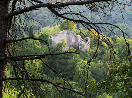 Le chateau feodal de Mazaugues, Var, France